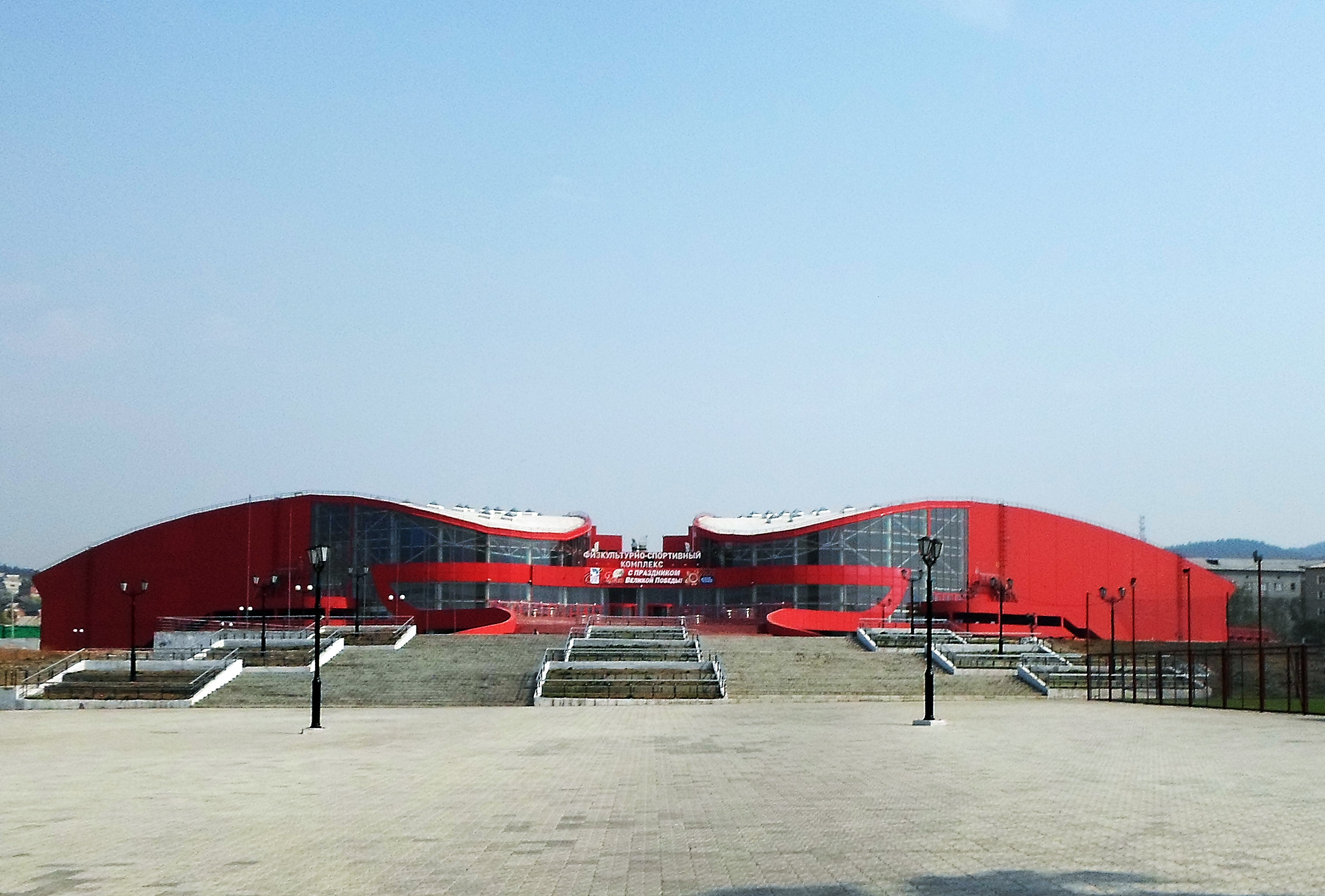 Физкультурно-спортивный комплекс в Улан-Удэ.